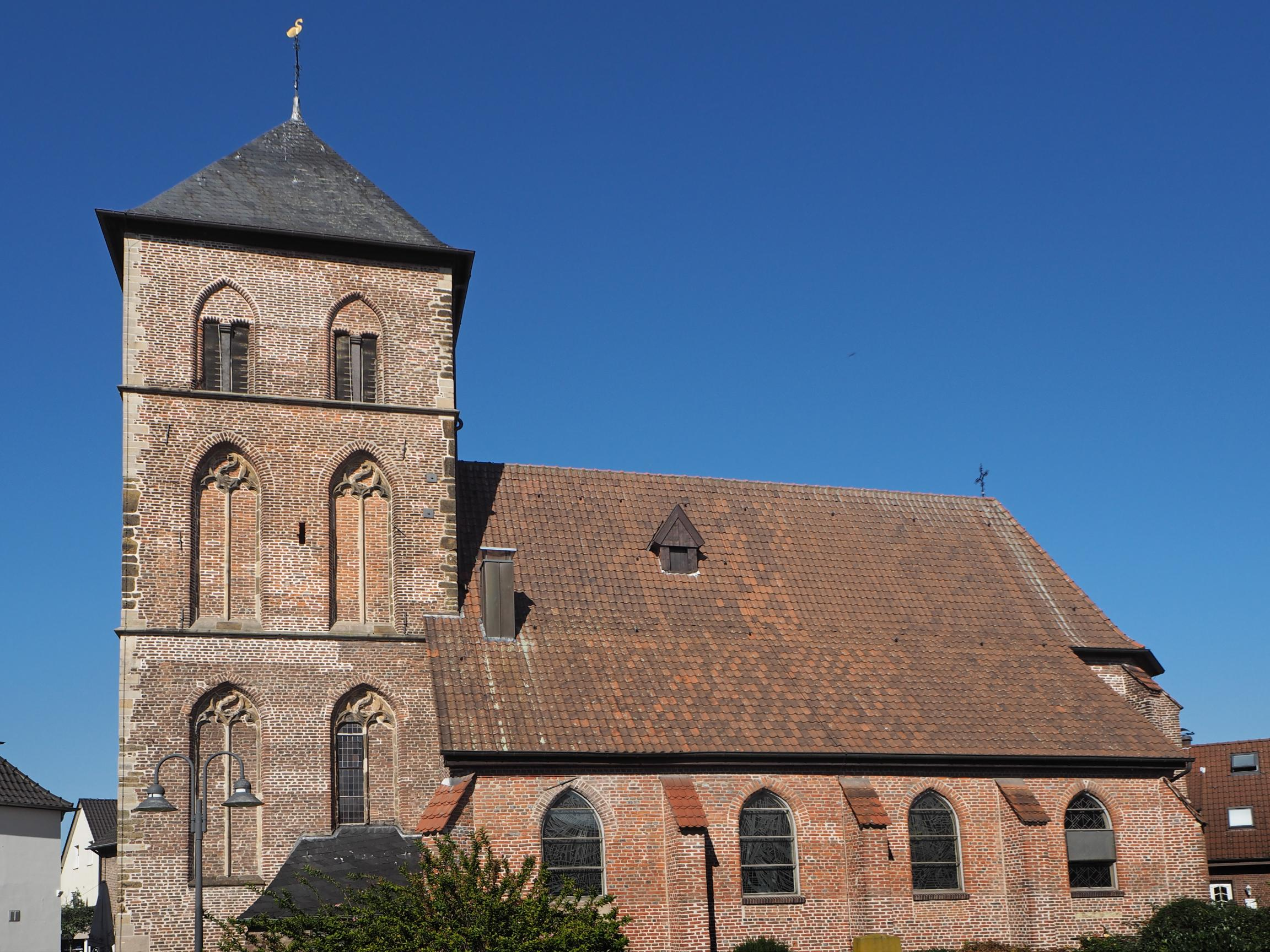 Schermbeck, NRW, St. Georg, Foto: Oktober 2015